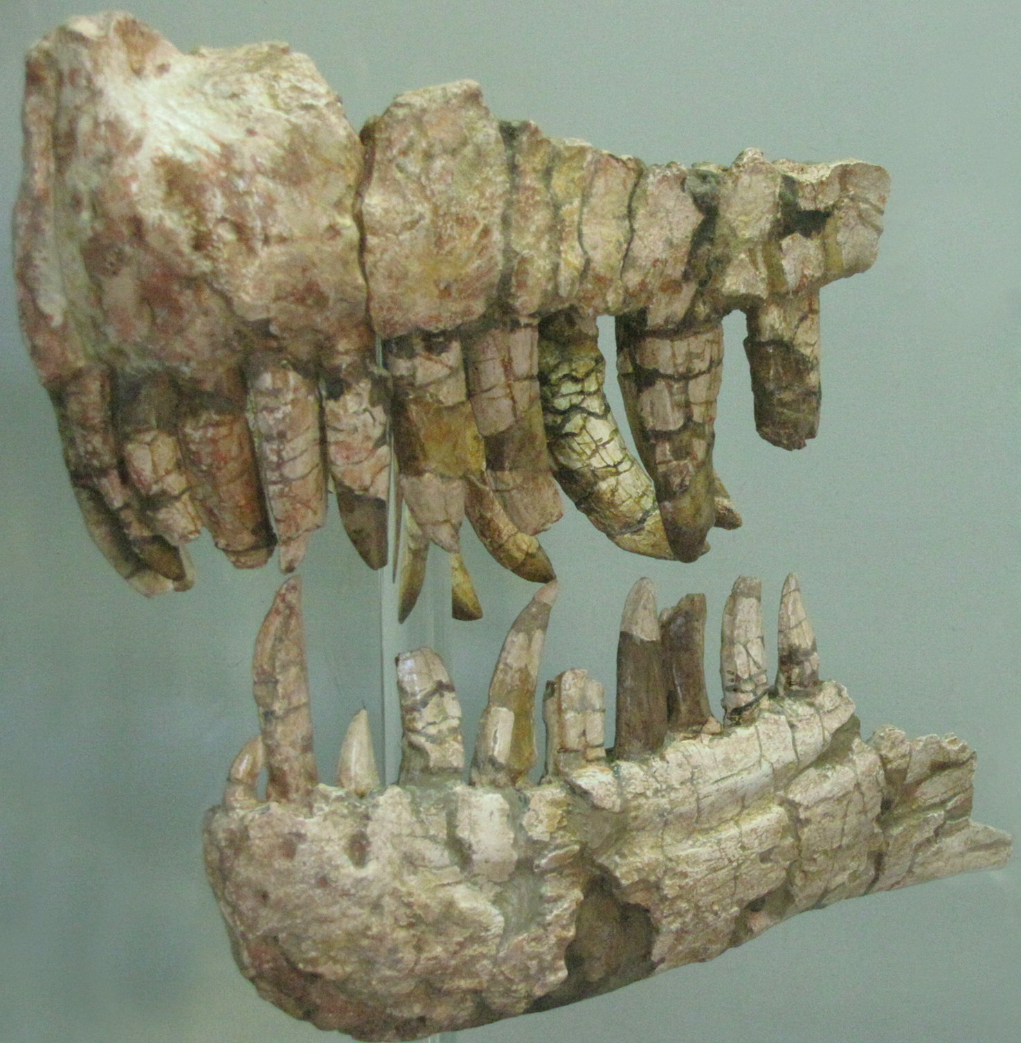 Porción anterior del cráneo del dinosaurio terópodo Genyodectes saurus. Se observan sus poderosos y afilados dientes, típicos de las formas carnívoras. Museo de Ciencias Naturales de La Plata.